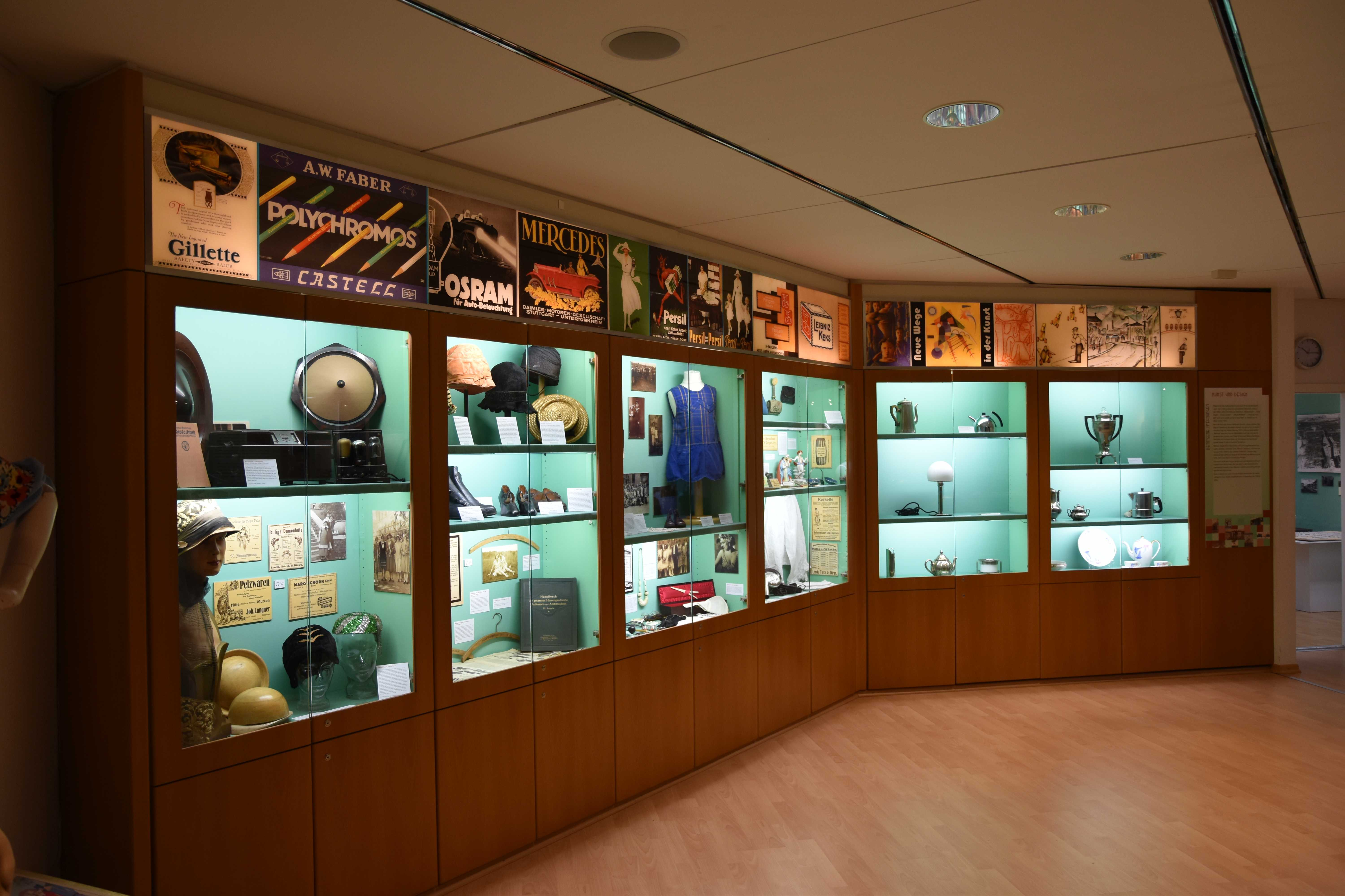 Betrogene Hoffnungen. Düren zwischen Aufbruch und Weltwirtschaftskrise 1919-1929.